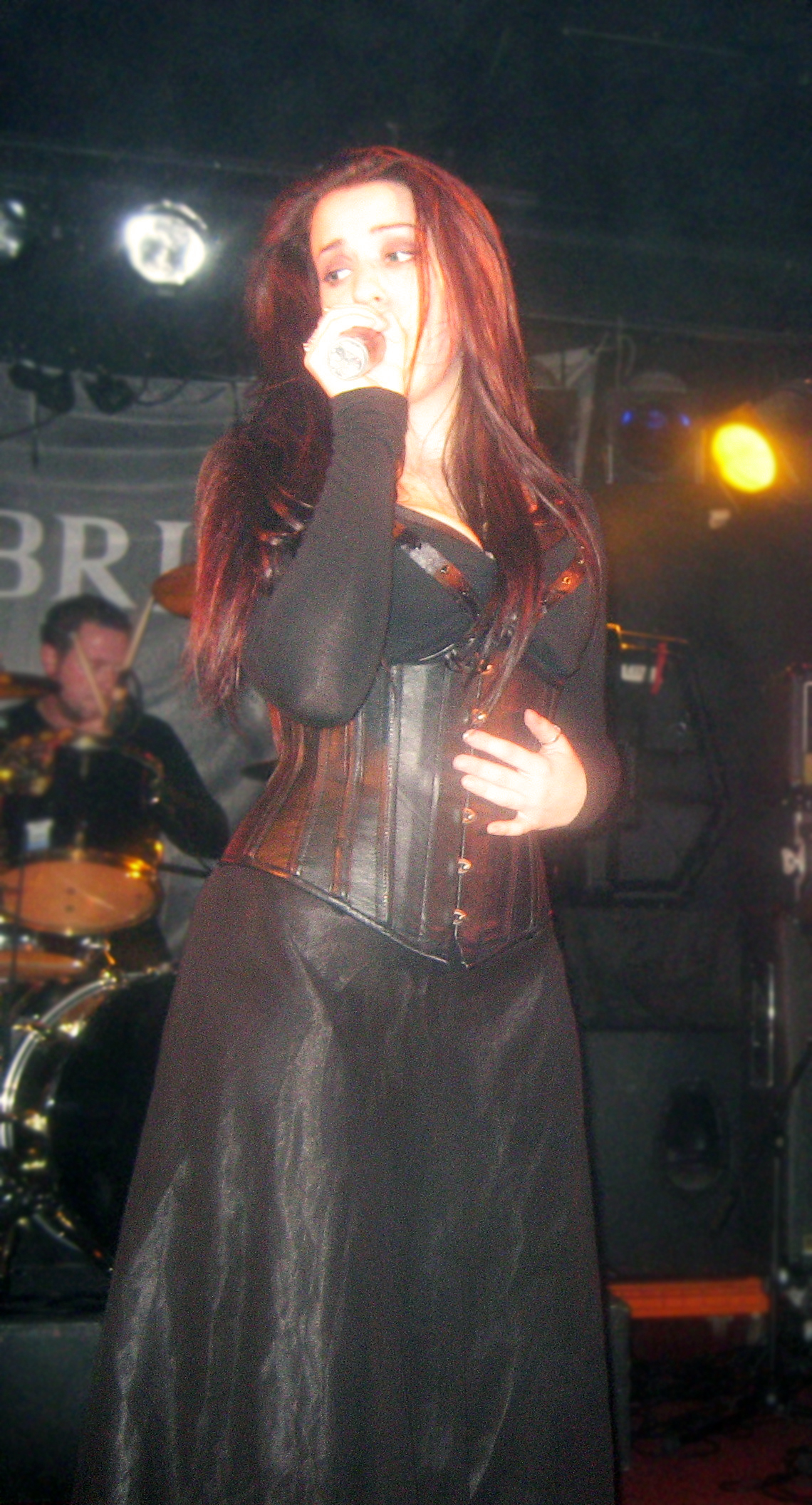 Сабина Эдельсбахер — вокалистка австрийской симфо-пауэр-метал-группы Edenbridge